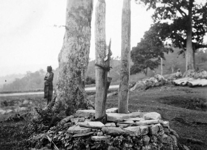 Foto. Offerplaats voor het huis van de raja van Nikiniki